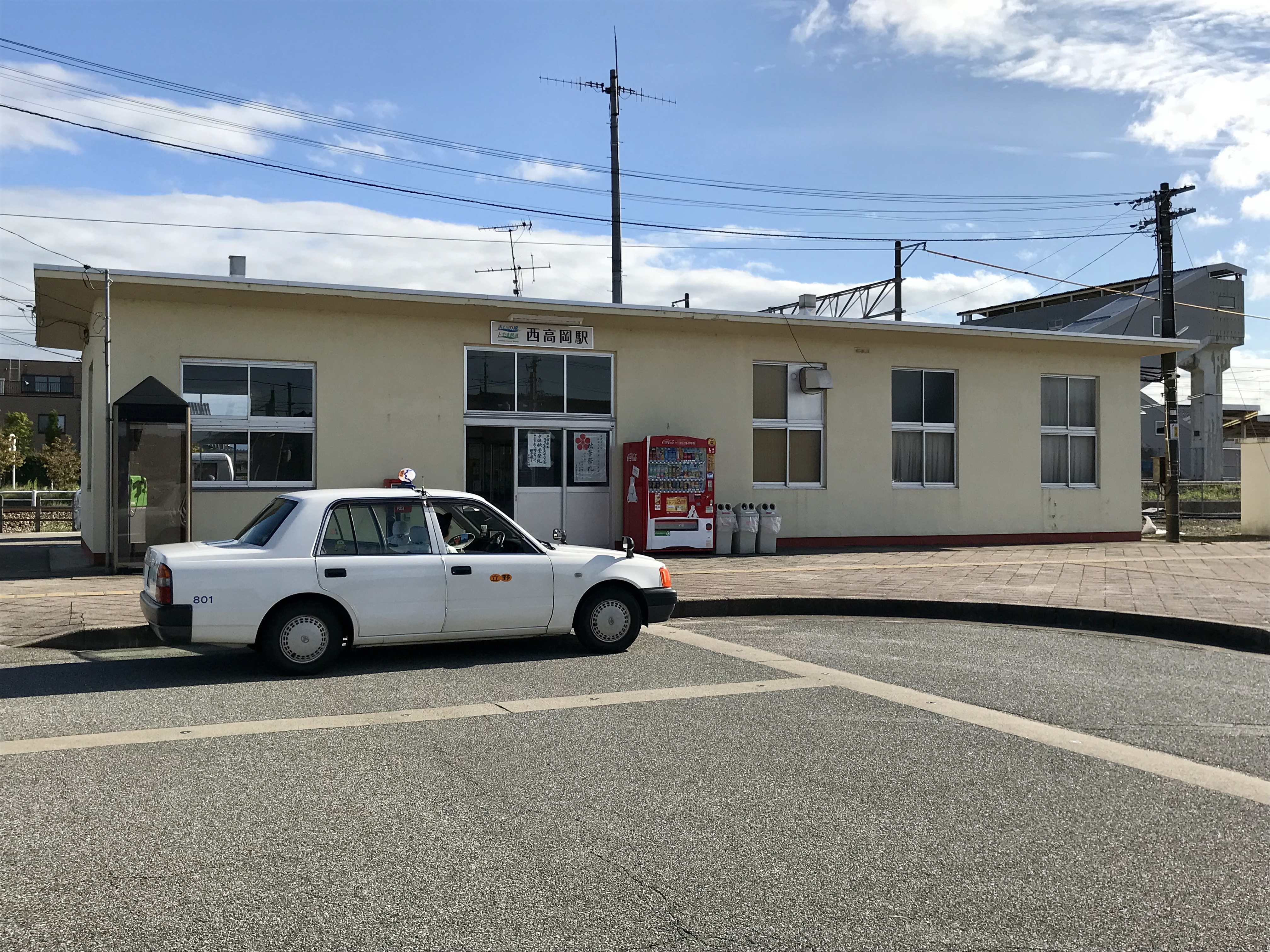 あいの風とやま鉄道西高岡駅駅舎